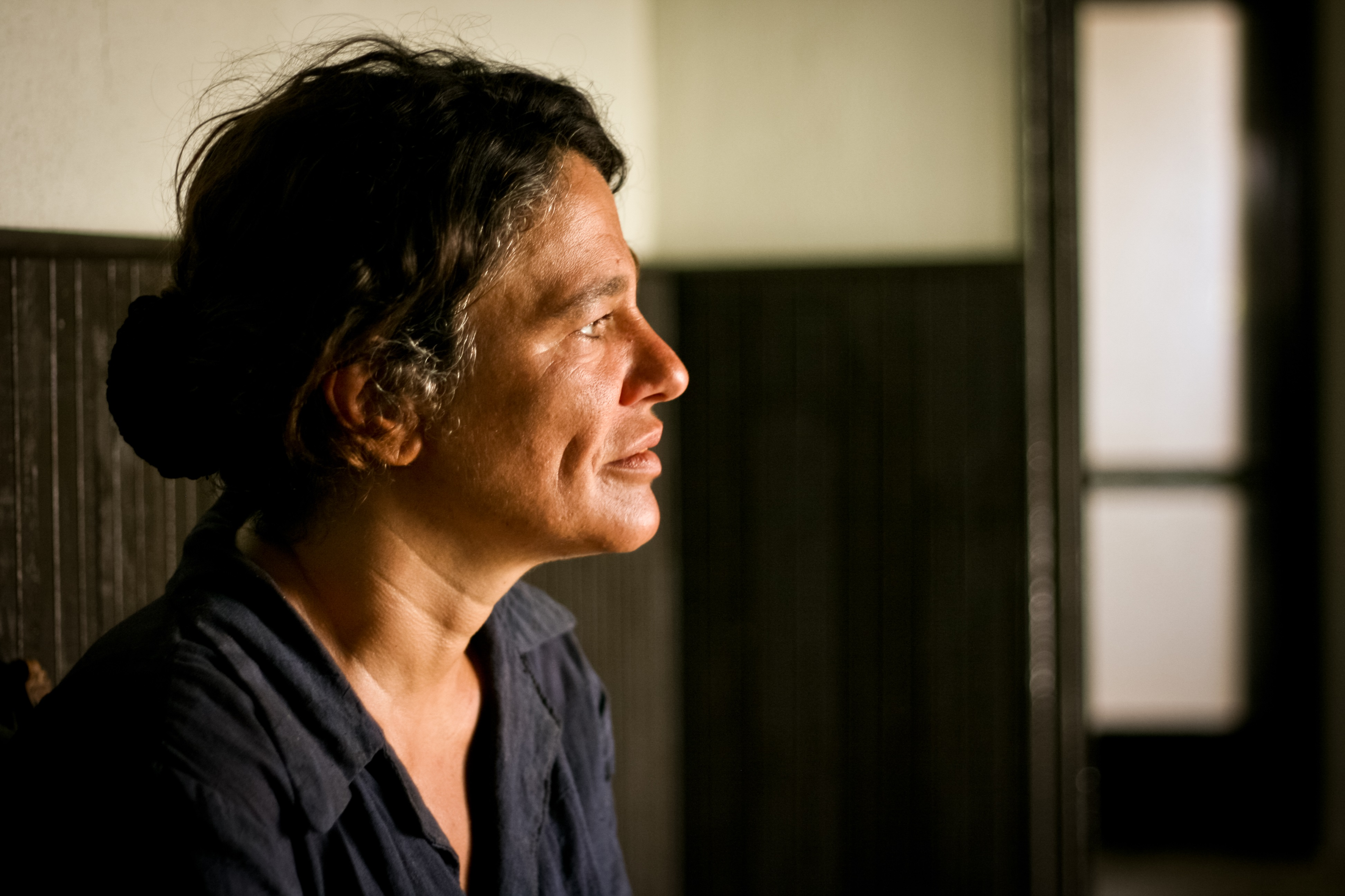 מירב גרובר בסרטו של אדם סנדרסון "לוויה בצהריים", 2013